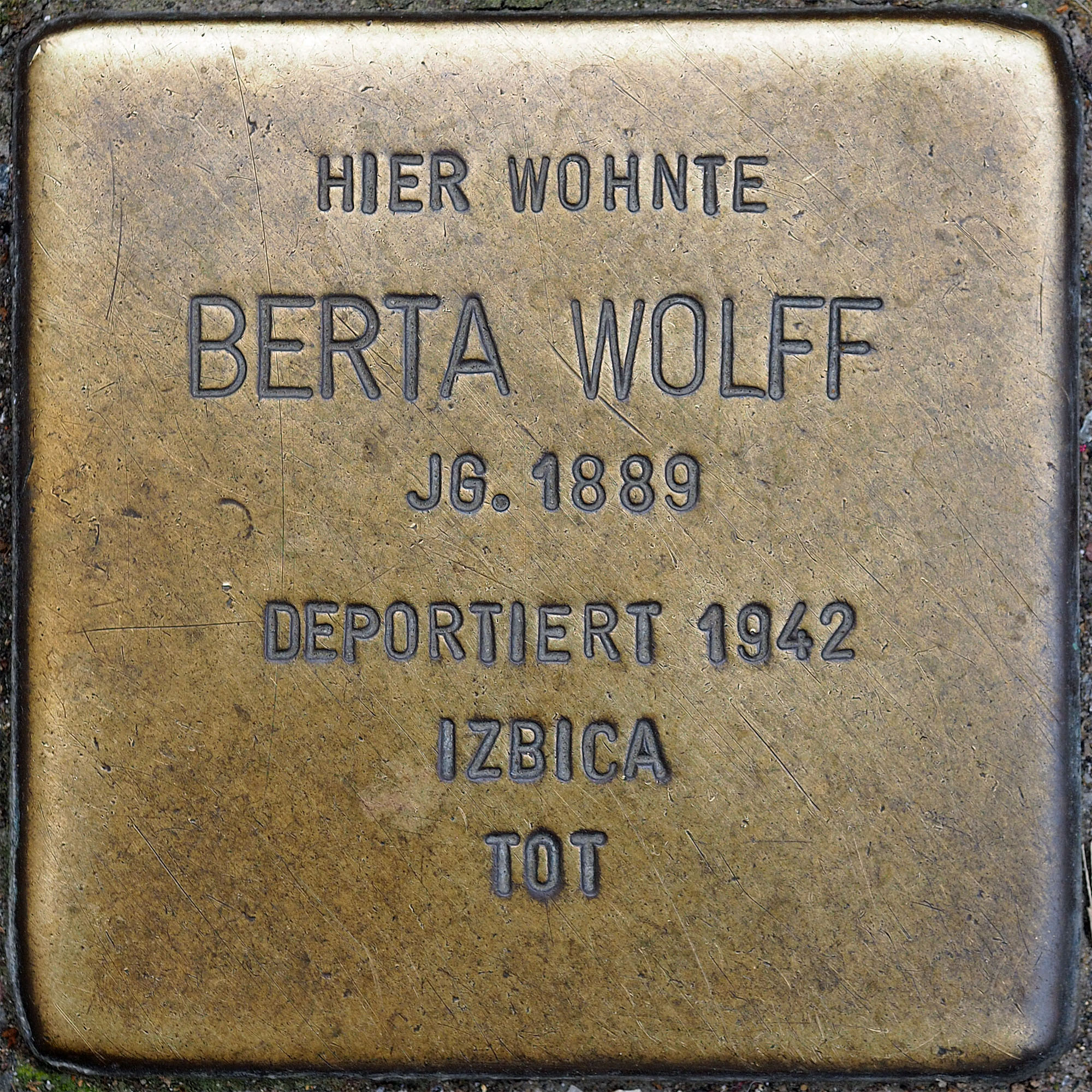 Stolpersteine MG: Wolff, Berta